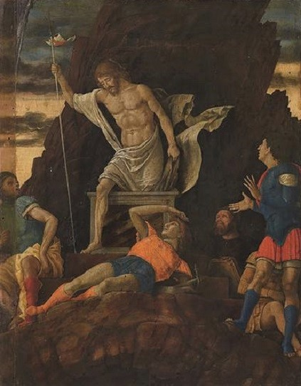 Resurrezione di Cristo, tempera su tavola, 48 x 37 cm, Accademia Carrara, Bergamo